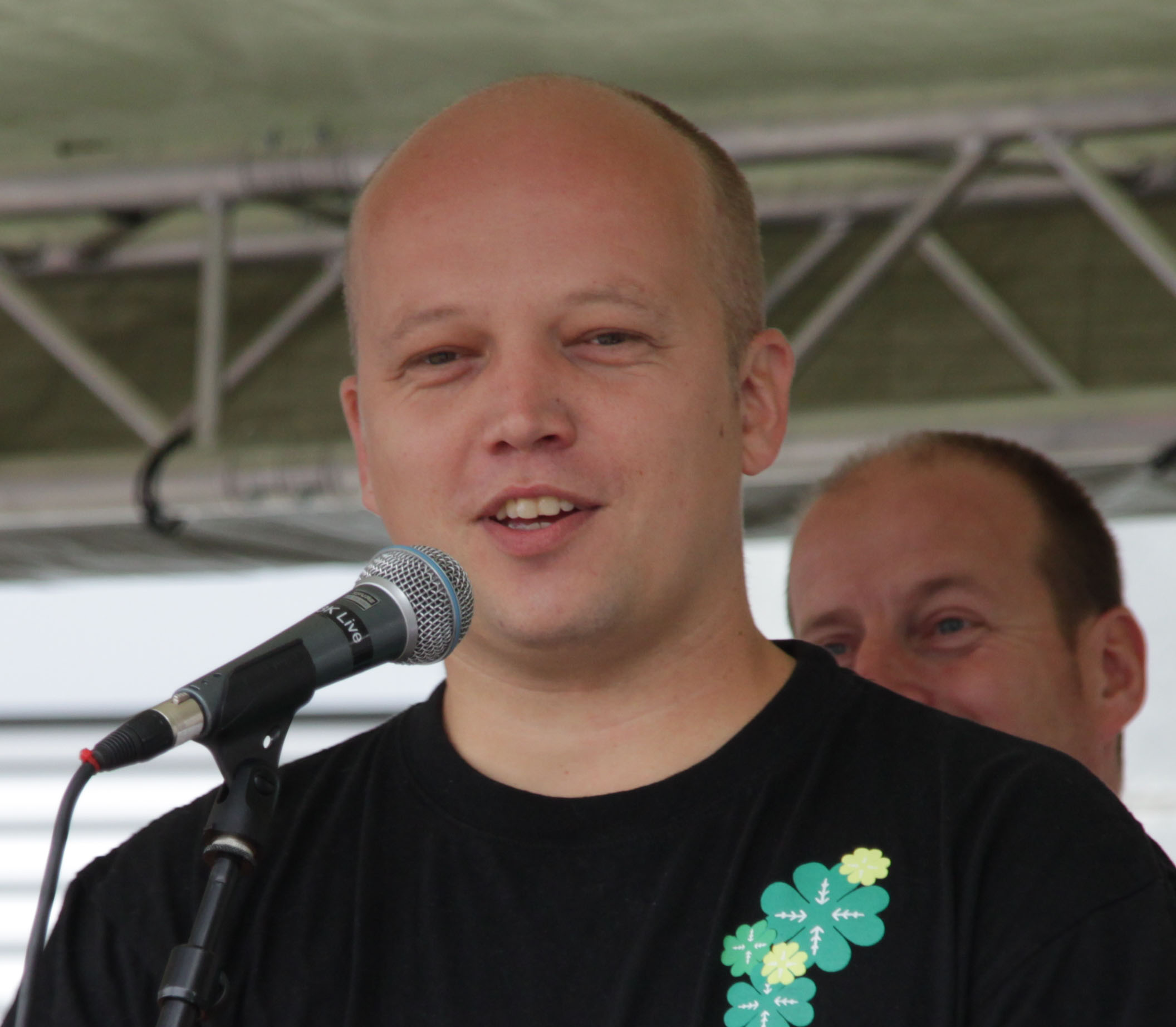 Trygve Slagsvold Vedum (Sp)under Landsmøte 2011 hos Naturvernforbundet.